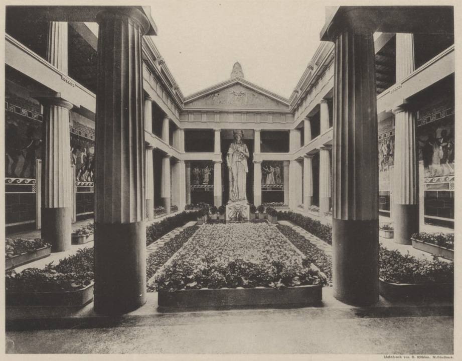 Innenhof des Diorama (1904): "Das Bild der Göttin, eine vom Bildhauer Adolf Simatschek modellierte Kolossalstatue, hatte an der bevorzugten Stelle im Inneren des säulenumgebenen Hofes Aufstellung gefunden. Auch der von demselben Künstler ausgeführte Schmuck der Giebelfelder folgte in der symbolischen Darstellung der Fruchtbarkeit der Erde und ihrer Vegetation diesem Gedanken, und ebenso hatte er in dem, nach antiken Vasenbildern vom Maler Carl Hemming (Hemming war seit 1893 Mitinhaber der Firma Carl Hemming u. Witte) komponierten und gemalten Festzuge, der sich an den Wänden des Umgangs entlang dem Bilde der Göttin nahte, Ausdruck gefunden."